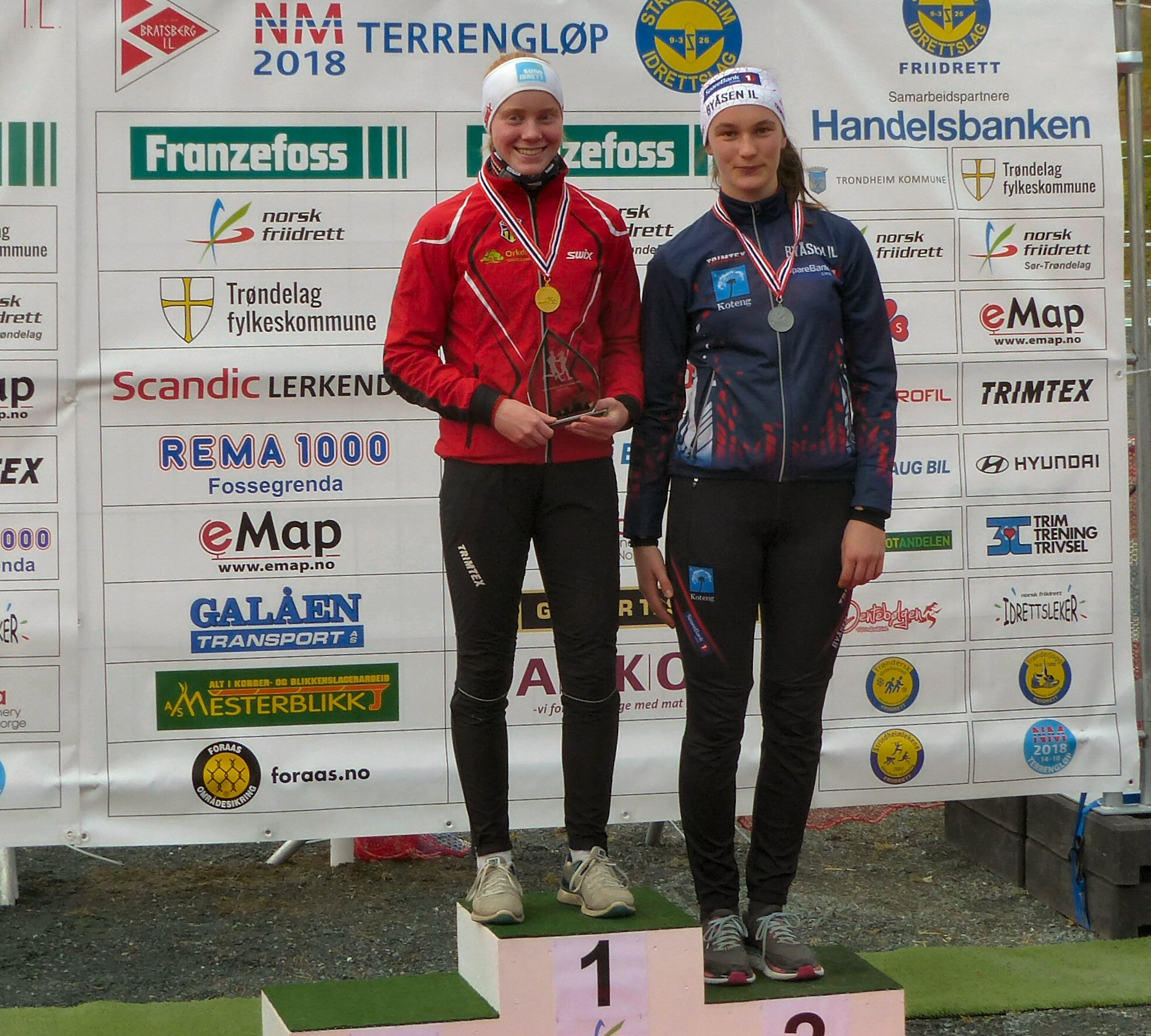 NM i terrengløp, lang løype, Bratsberg - Trondheim, 2018. Seierspallen for klassen J16.